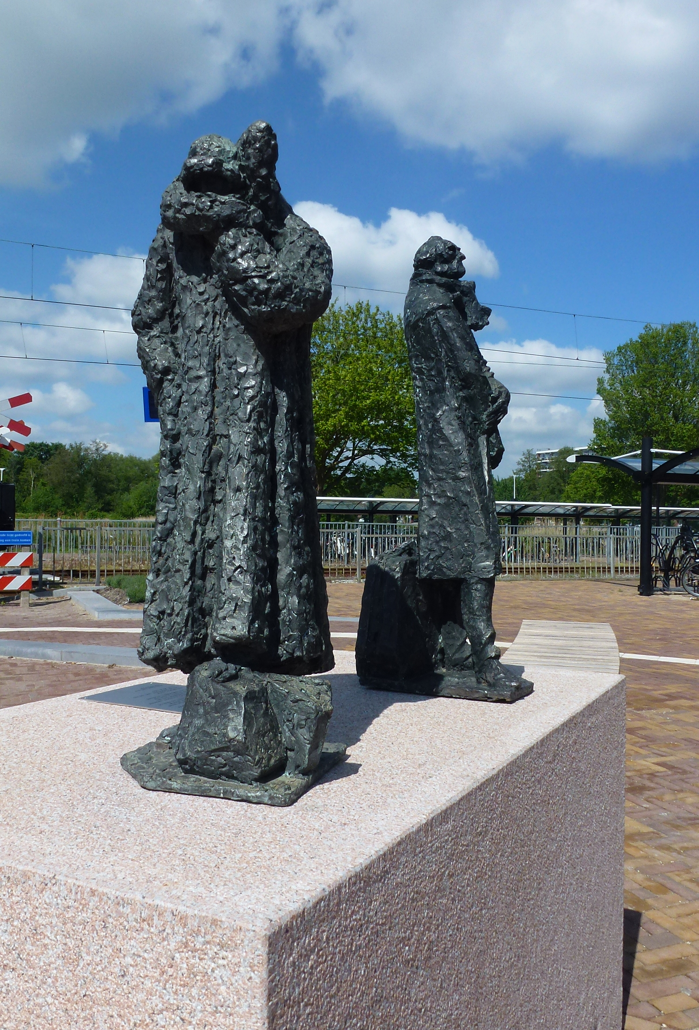 Sculptuur Wachtende reizigers uit 1984 van Willem G. van de Hulst. Oorspronkelijk waren het drie figuren. In 2015 is een van de drie figuren gestolen. De beelden zijn daarna verwijderd en in april 2019 zijn de opgeknapte beelden teruggeplaatst bij station Waddinxveen. Op de sokkel is een plaquette met het gedicht Wachtende reizigers van dorpsdichter Piet Hardendood geplaatst